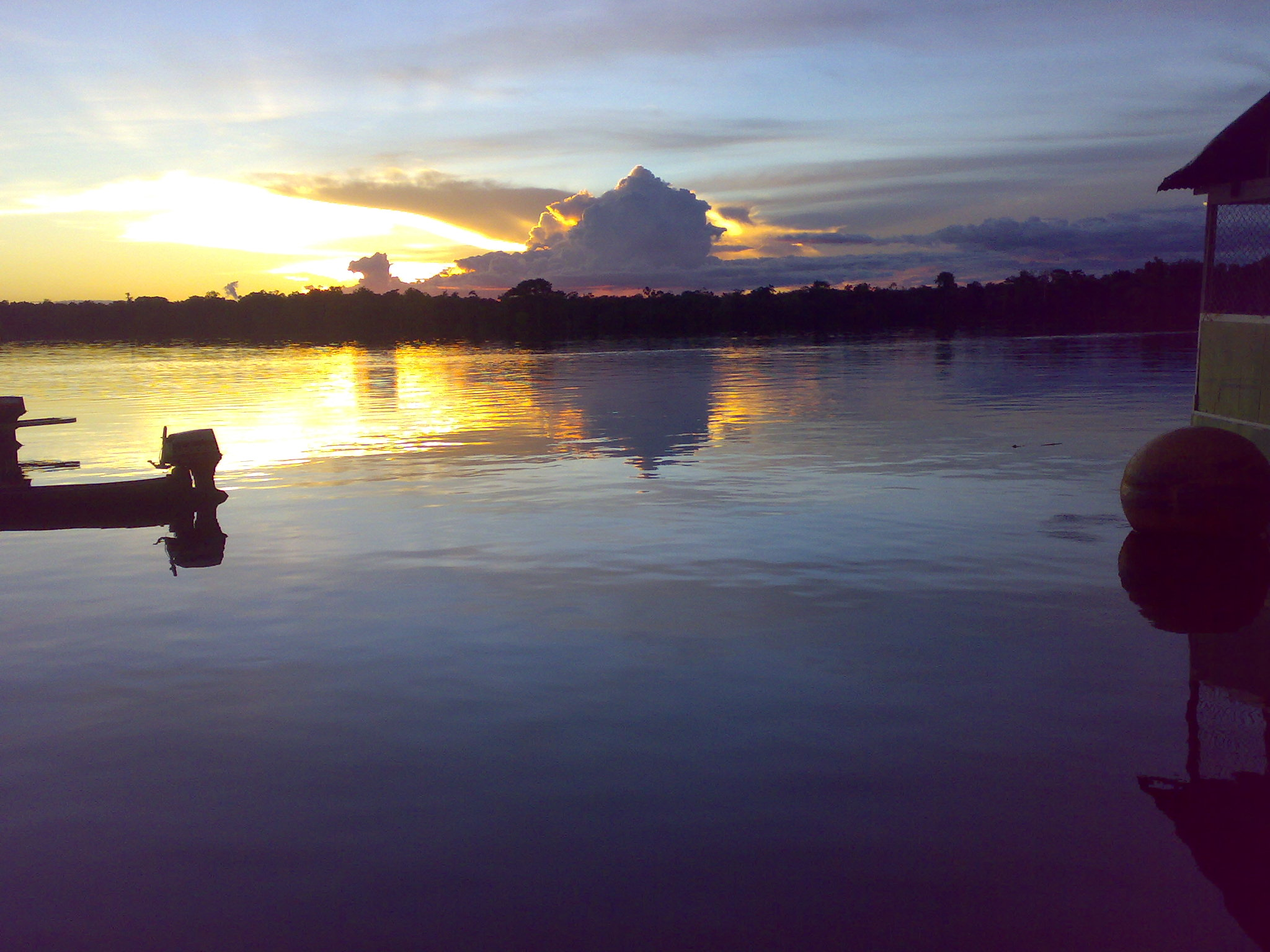 Rio Inírida